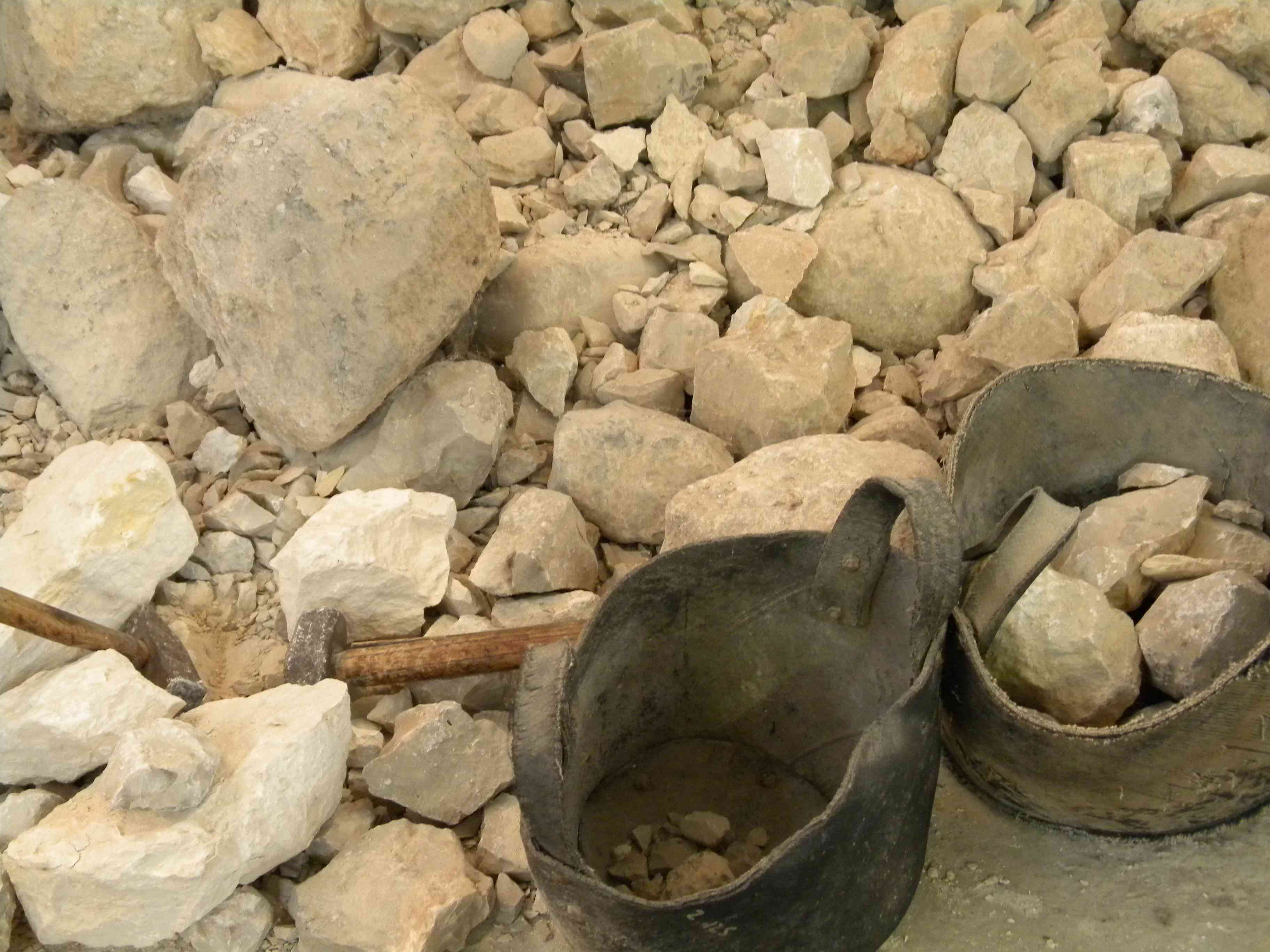 עמדת עבודה של סתת עם אבנים בתהליך סיתות